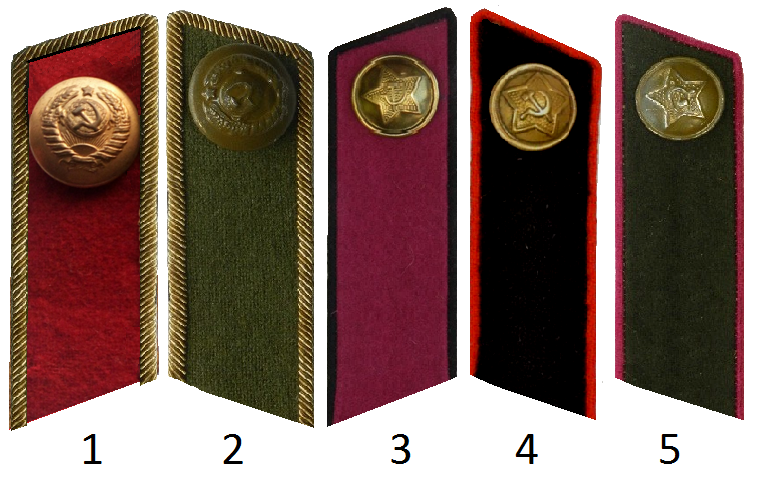 Петлицы шинели 1943